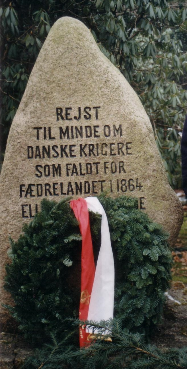 Grabmal auf dem Garnisonfriedhof Schleswig für die bei Schleswig im Deutsch-Dänischen Krieg gefallenen dänischen Soldaten